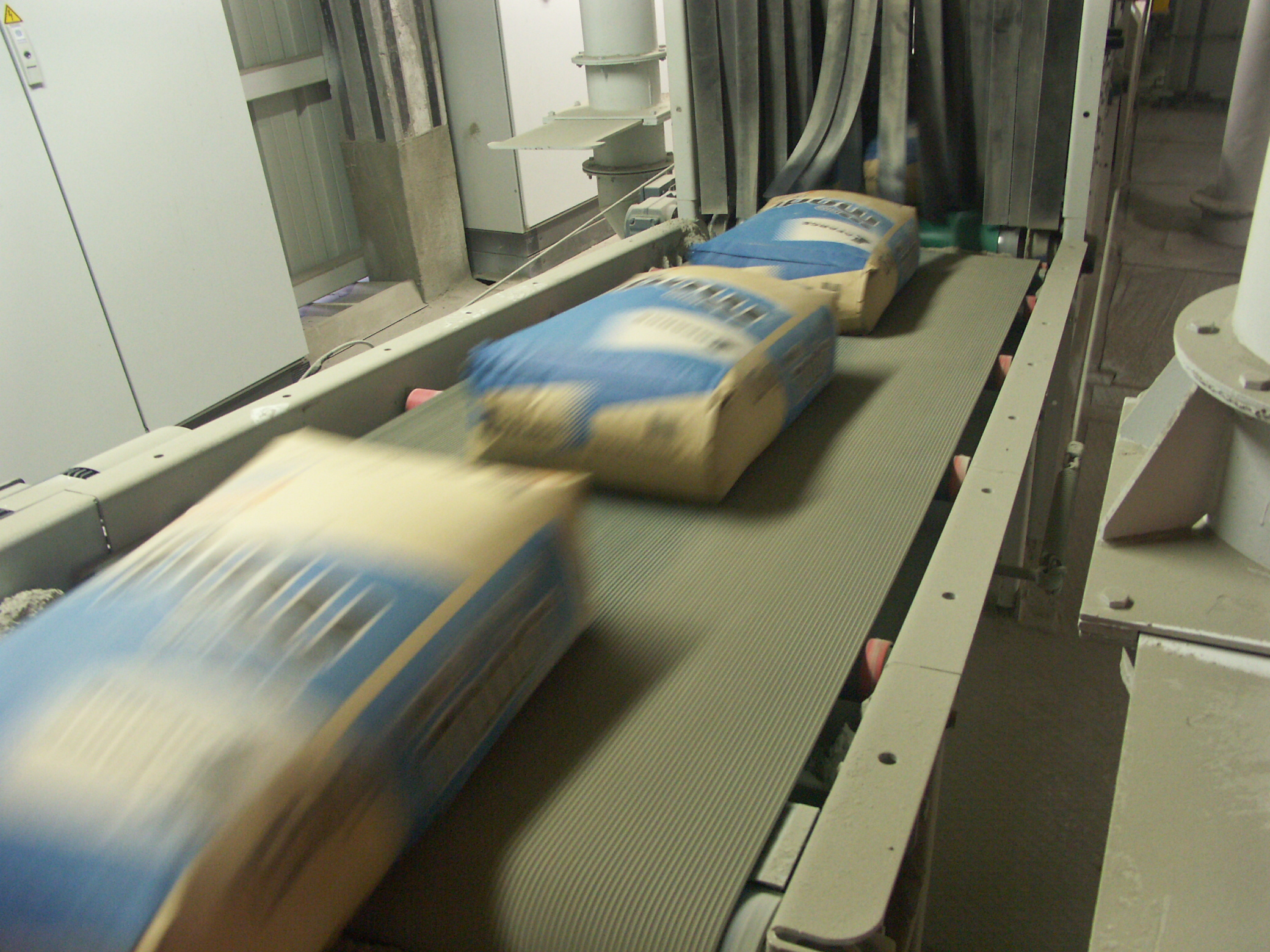 Na šesti točki je predstavljena odprema cementa